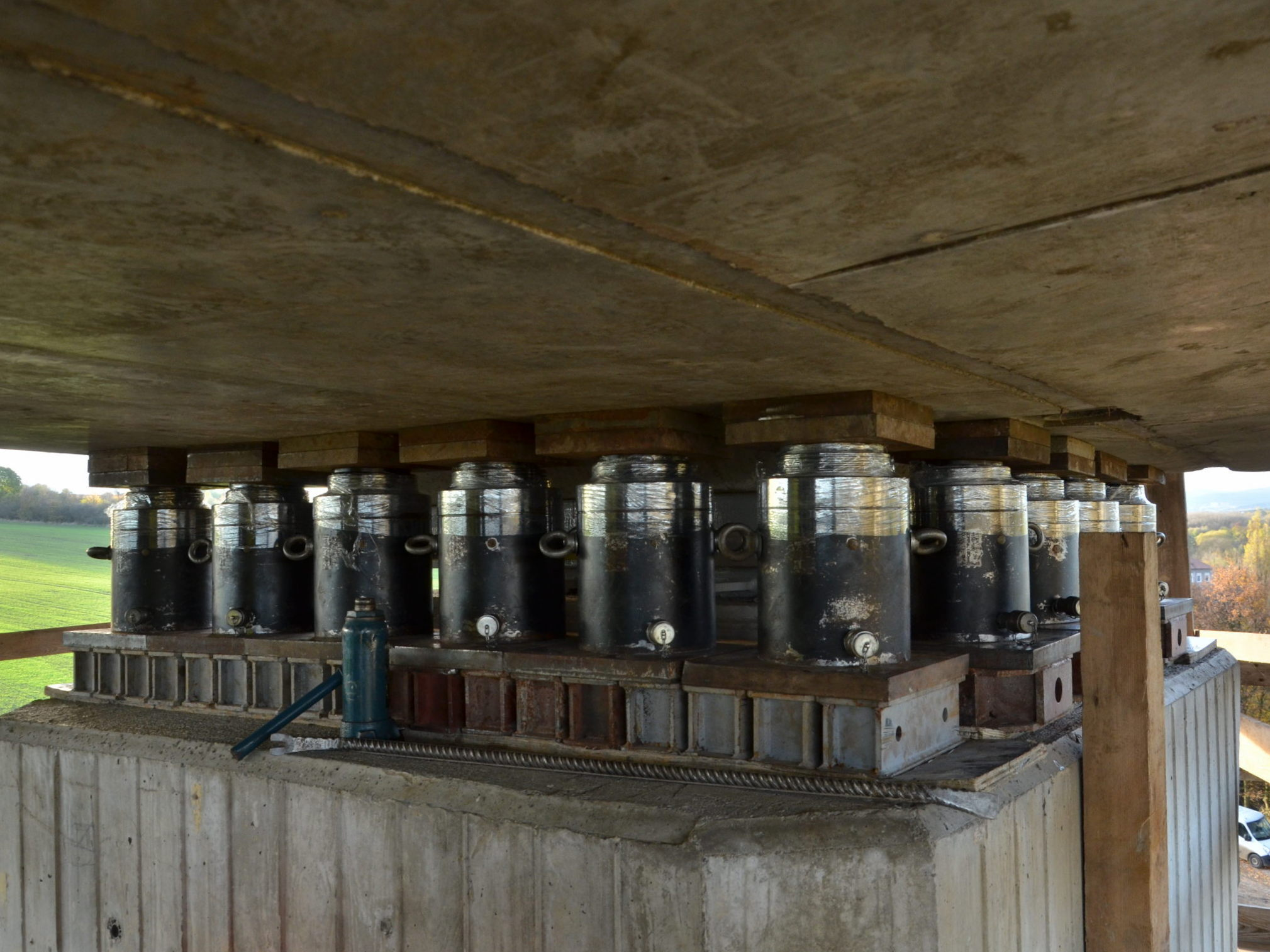 Velemyšleves - zvedání mostu zespodu z pilíře mostu bez podpěrné konstrukce.